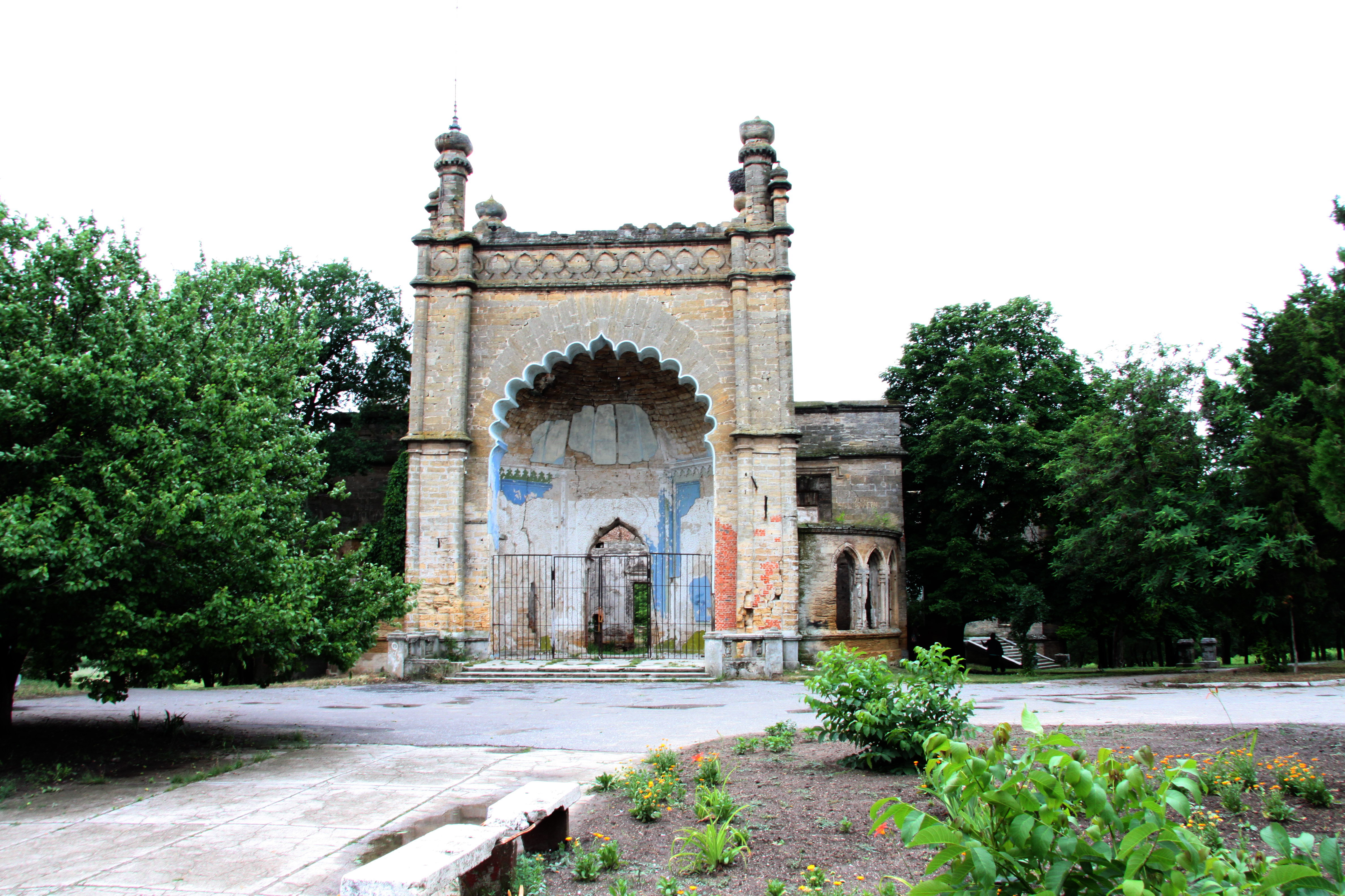 Палац, с. Петрівка